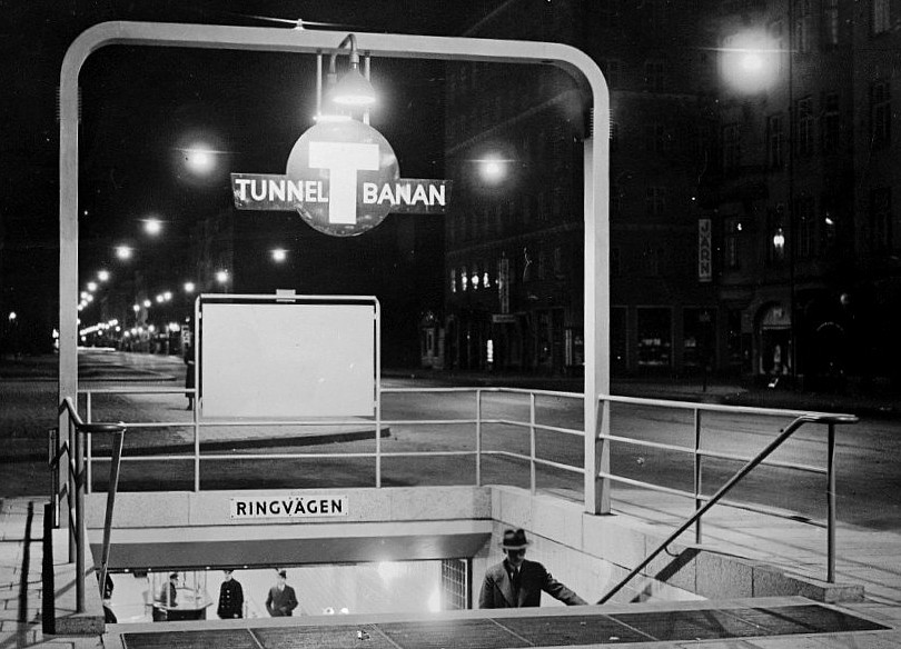 Nedgång till Tunnelbanan, station "Ringvägen" med T-symbolen (beskuren version). T_loggan är skapad av Karl Kalle Lodén